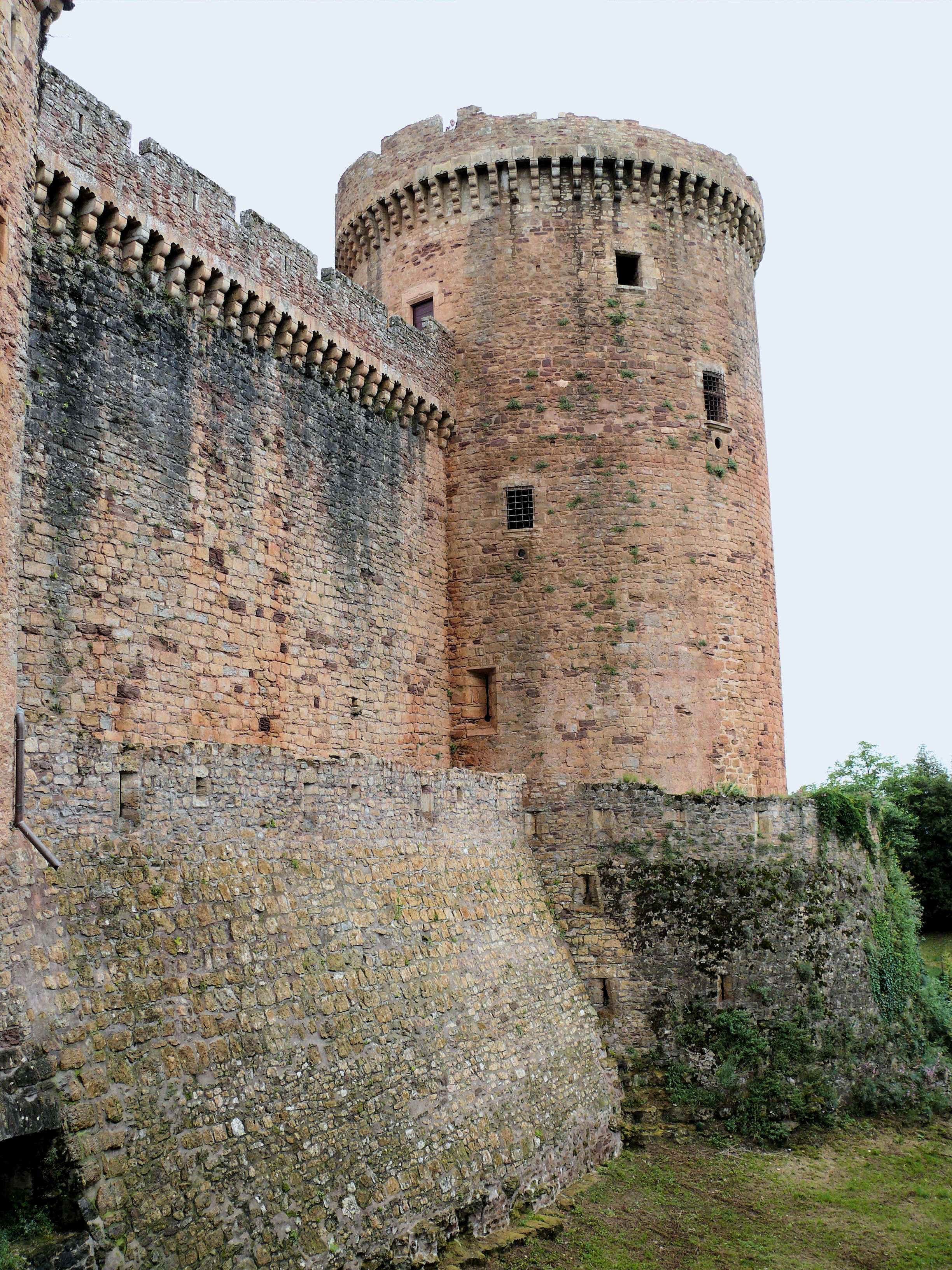 Château de Castelnau-Bretenoux - Tour militaire et fausses braies